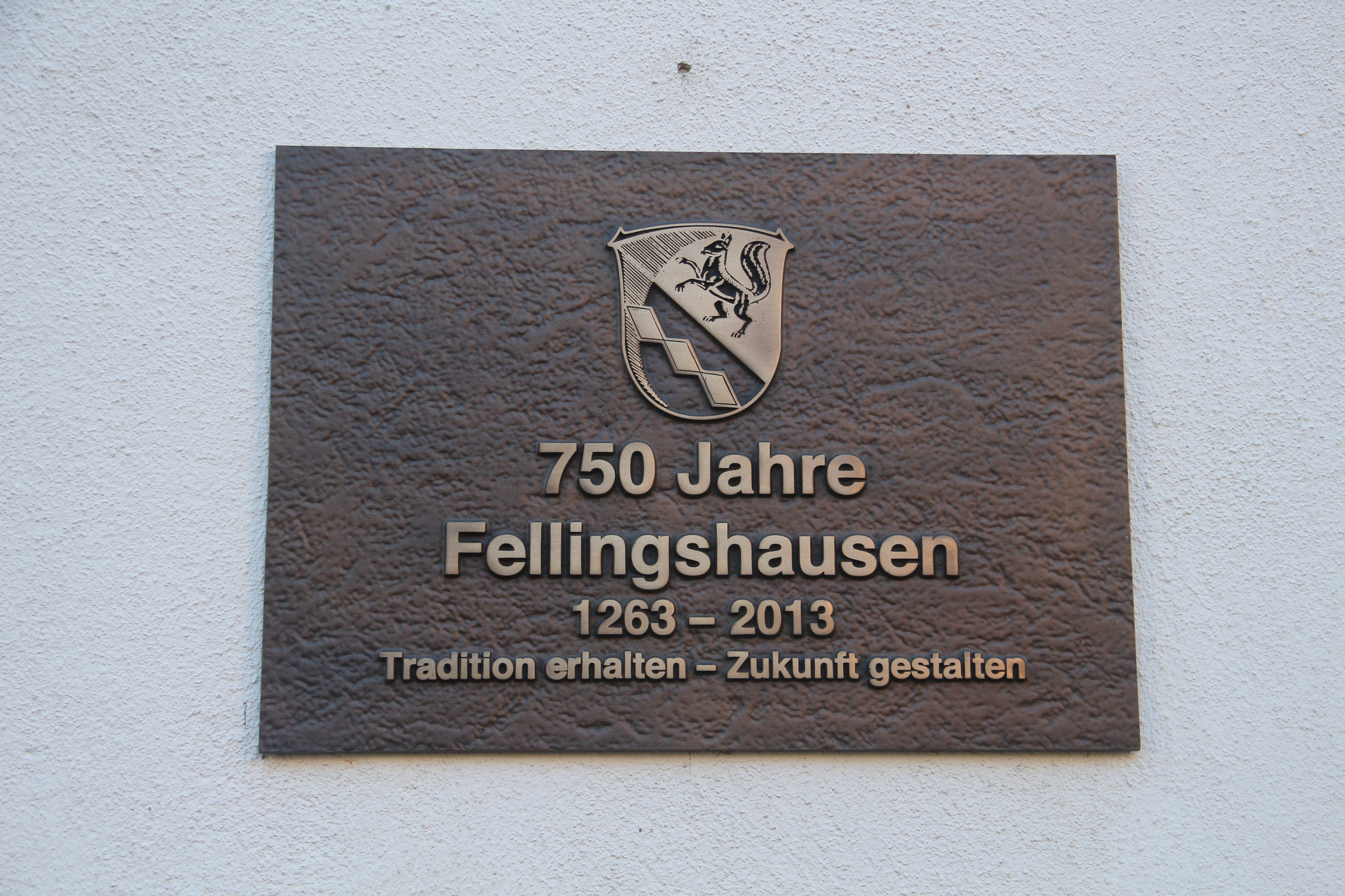 Fellingshausen